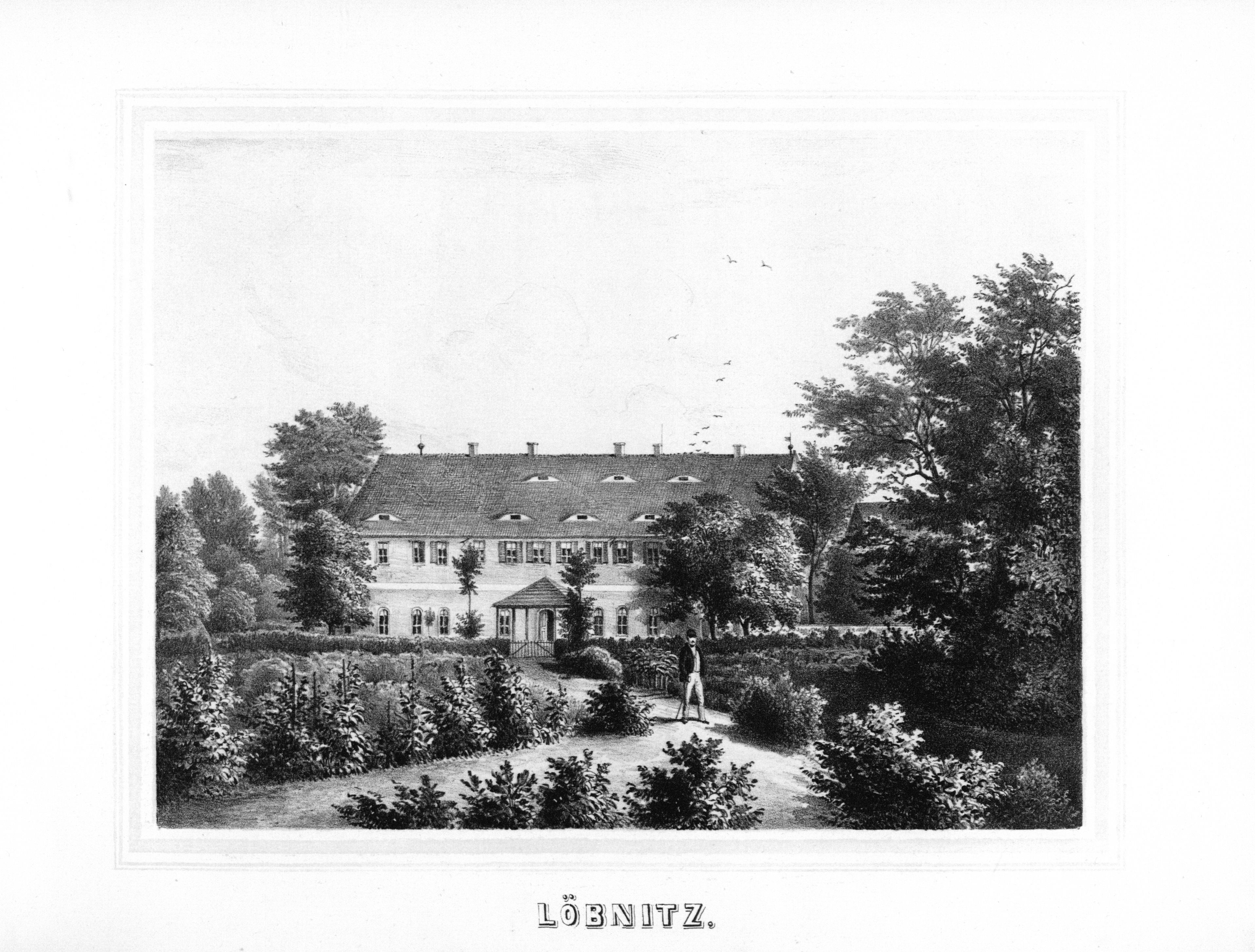 Löbnitz aus: Album der Rittergüter und Schlösser im Königreiche Sachsen Leipziger Kreis Section: I